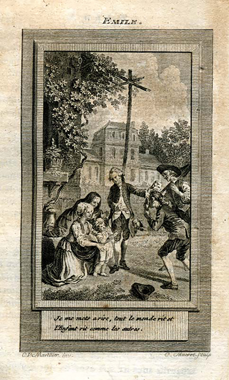 gravure